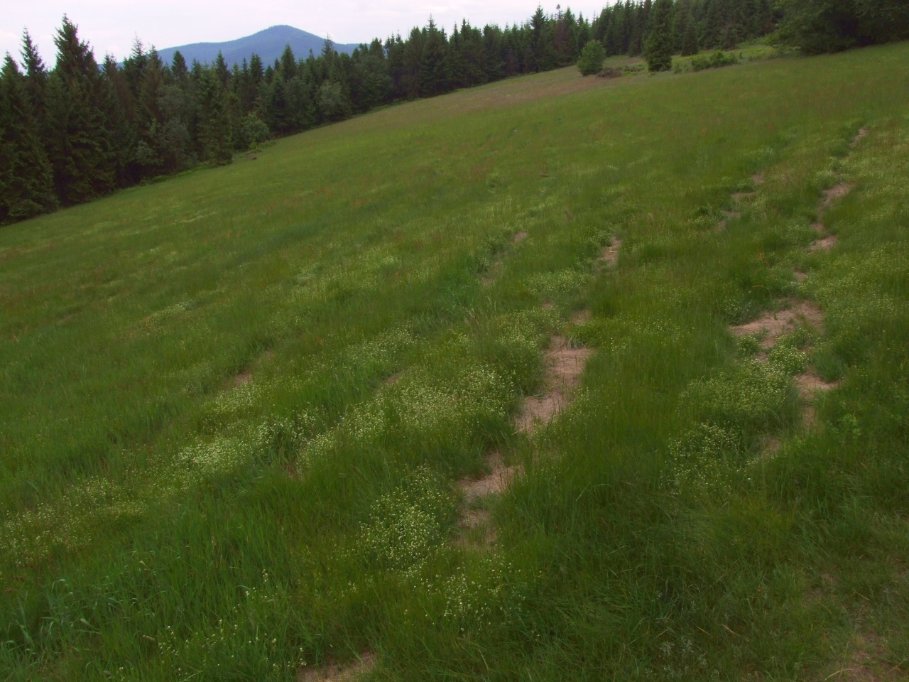 Polana Jaworze na Łopieniu (Beskid Wyspowy)